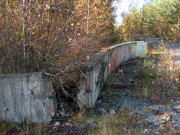 Keimolan moottorirata, syksy 2005, kuva: Nalle Westman